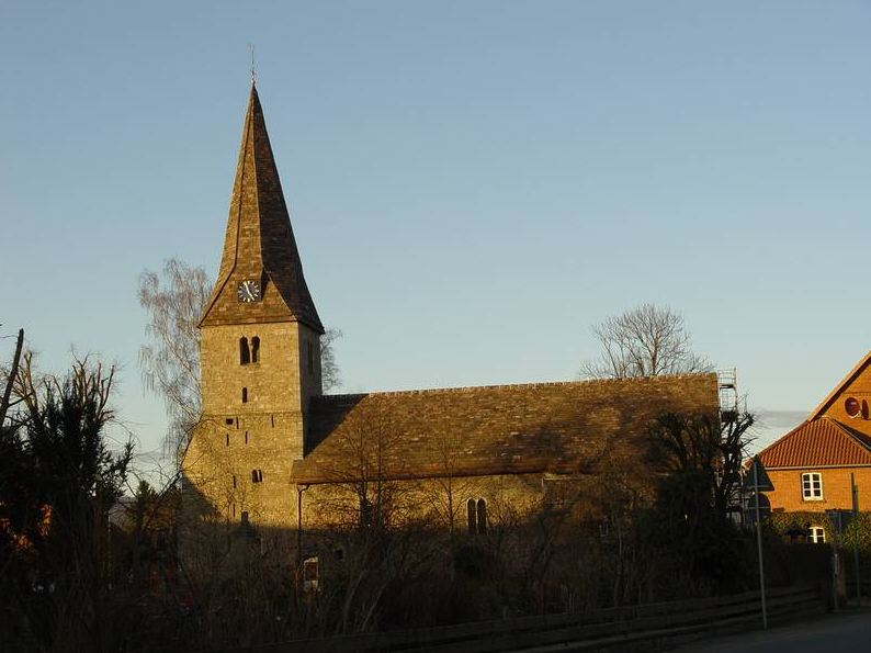 Kirche zu Fuhlen im Herbst